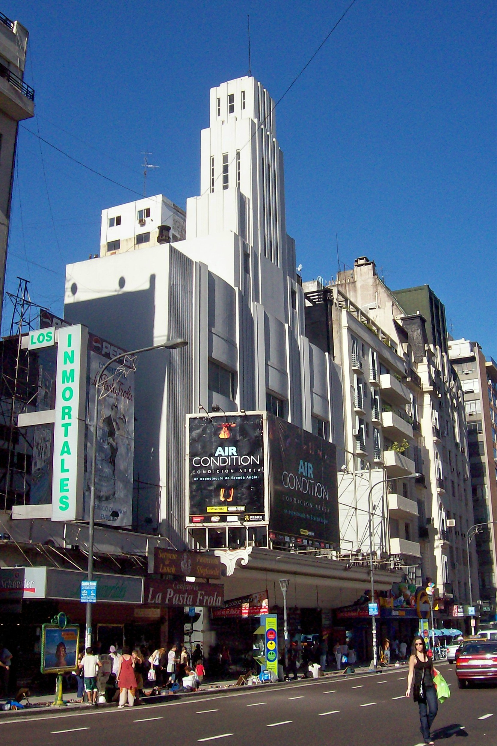 Teatro Metropolitan en Avenida Corrientes 1343, Buenos Aires.